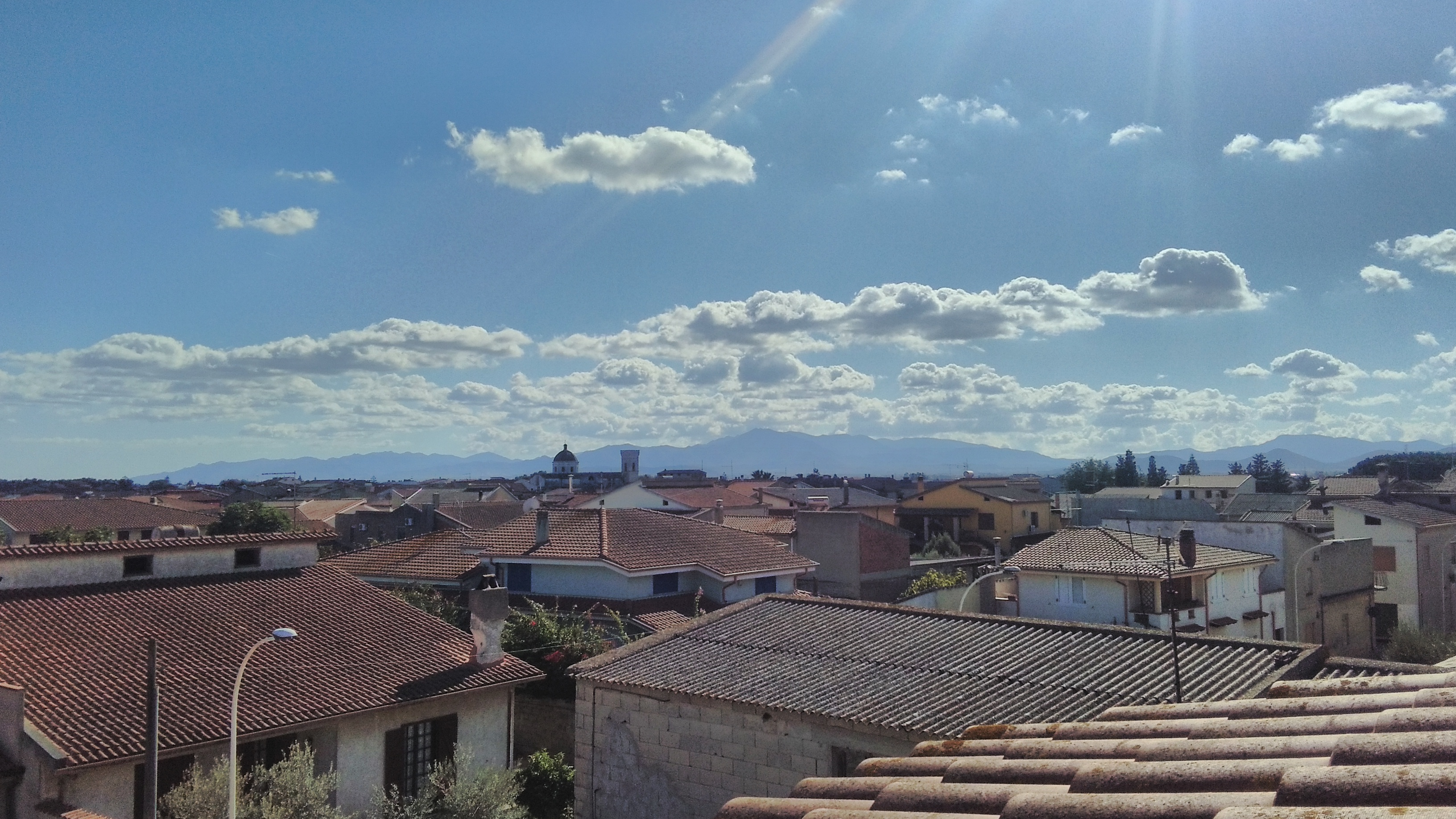 Villasor dall'alto